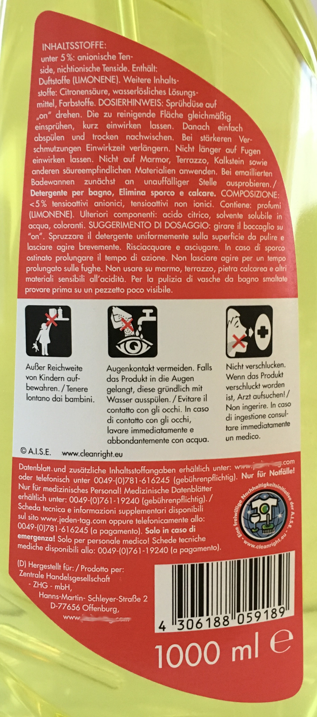 Label eines Badreinigers